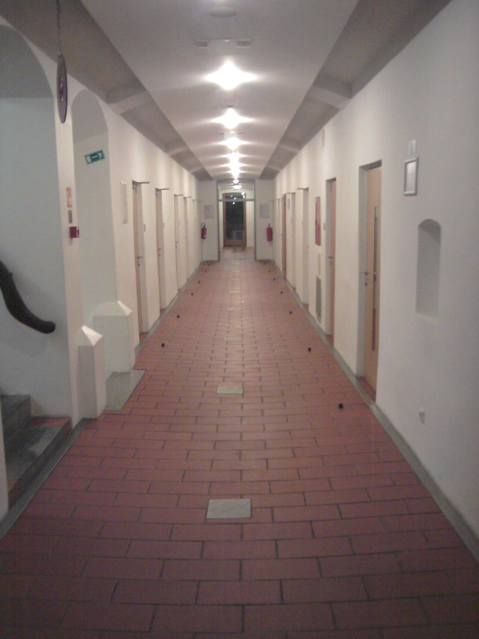 Порано затвор.